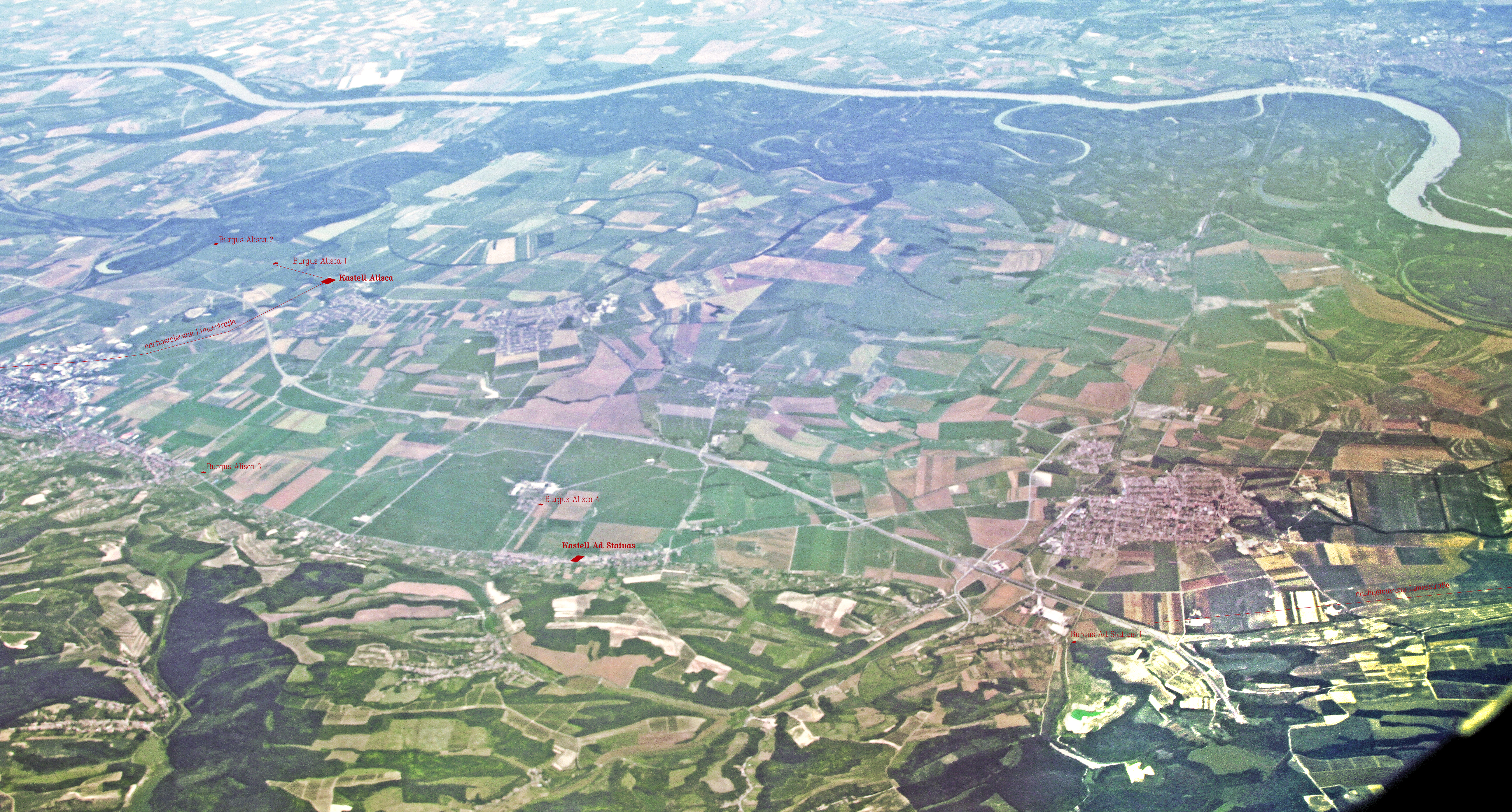 Luftbild von Szekszard und Bataszek, Komitat Tolna, Südungarn, 2012, mit Einzeichnung der römischen Fundorte.